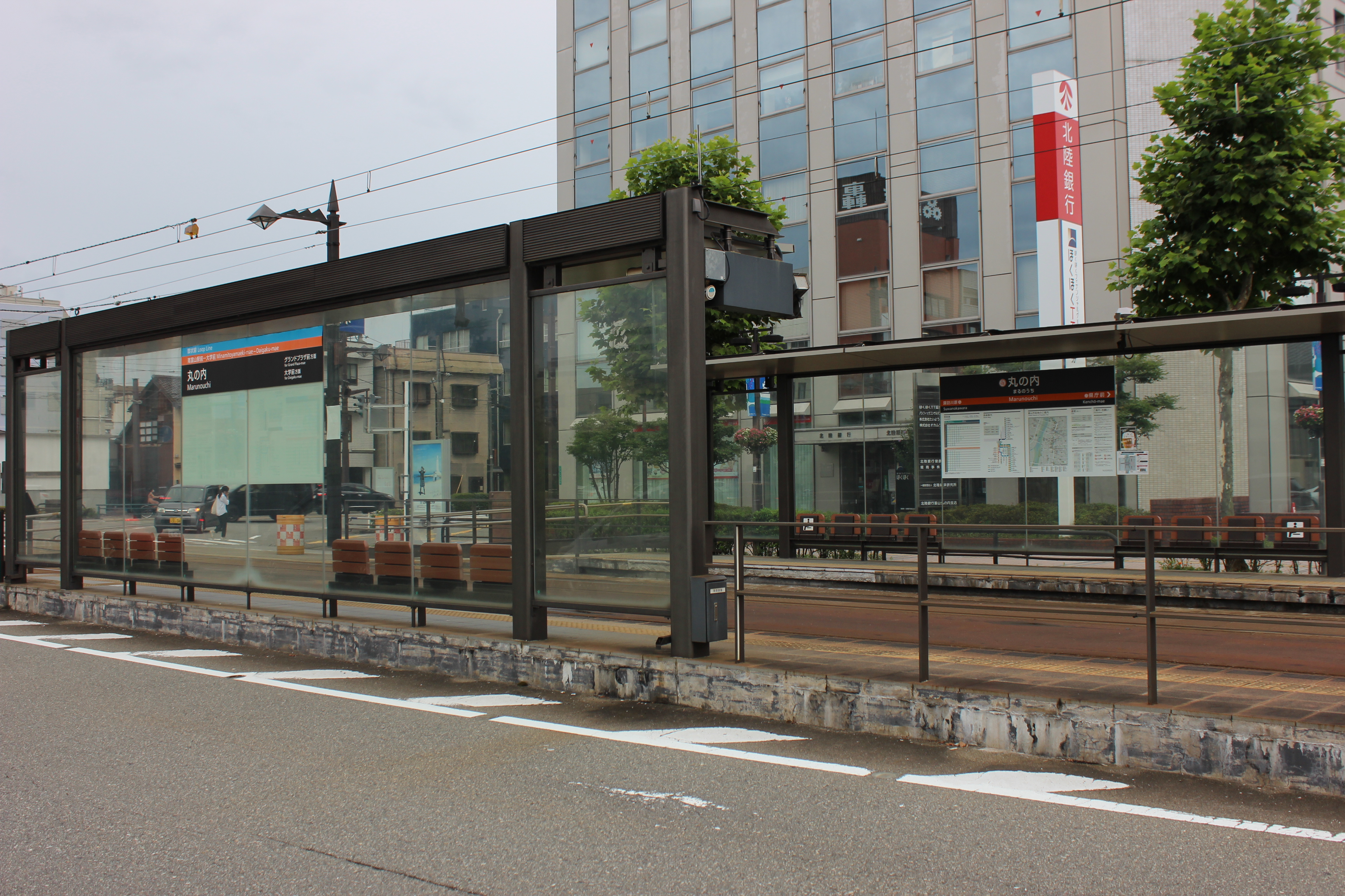 丸の内停留場（富山県富山市）